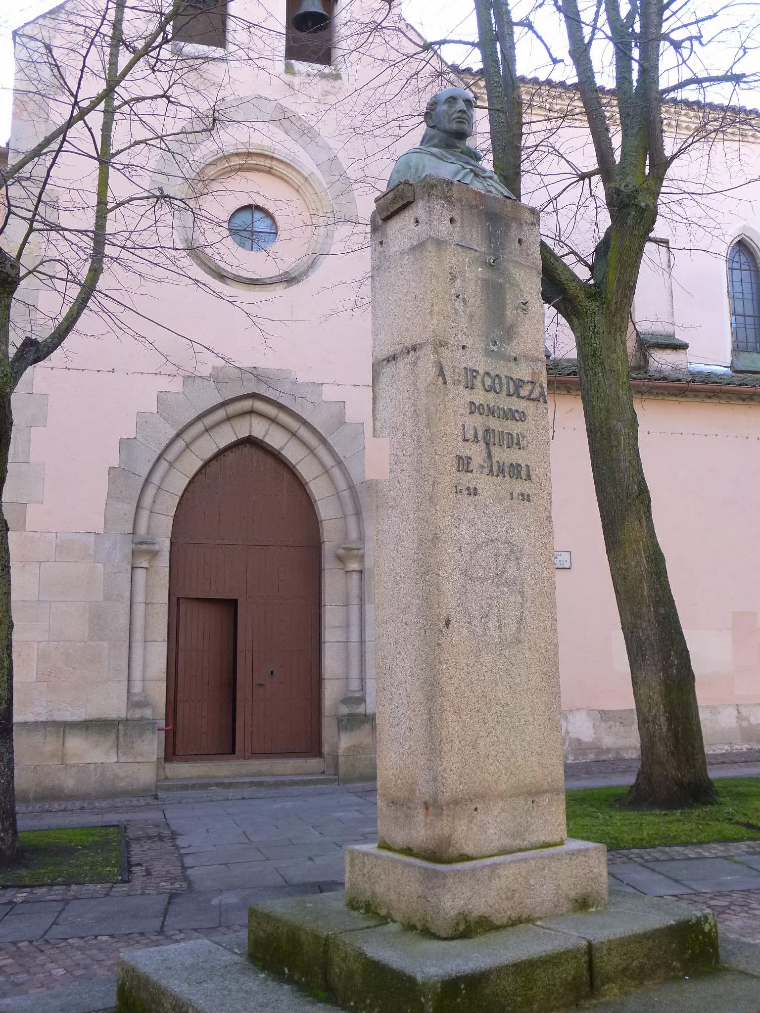 Zamora - Convento de Santa Marina (Clarisas) y Monumento a Fray Diego de Deza.